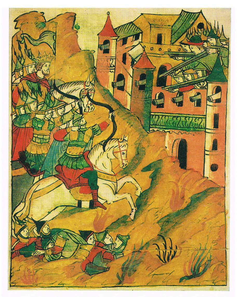 Миниатюра из Лицевого летописного свода (XVI век) - осада